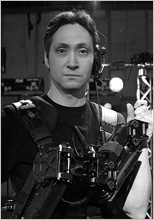 Filmfotograf Dick Ying